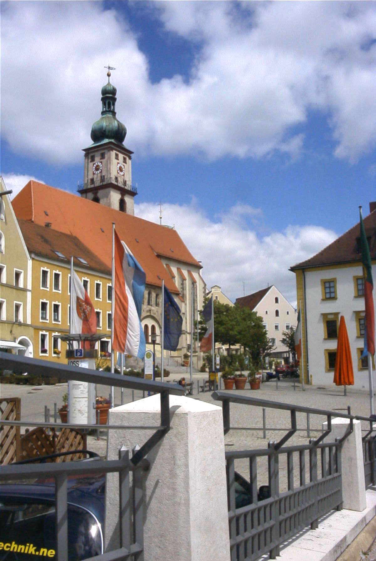 Der Marktplatz von Sulzbach-Rosenberg mit kath. Pfarrkirche.